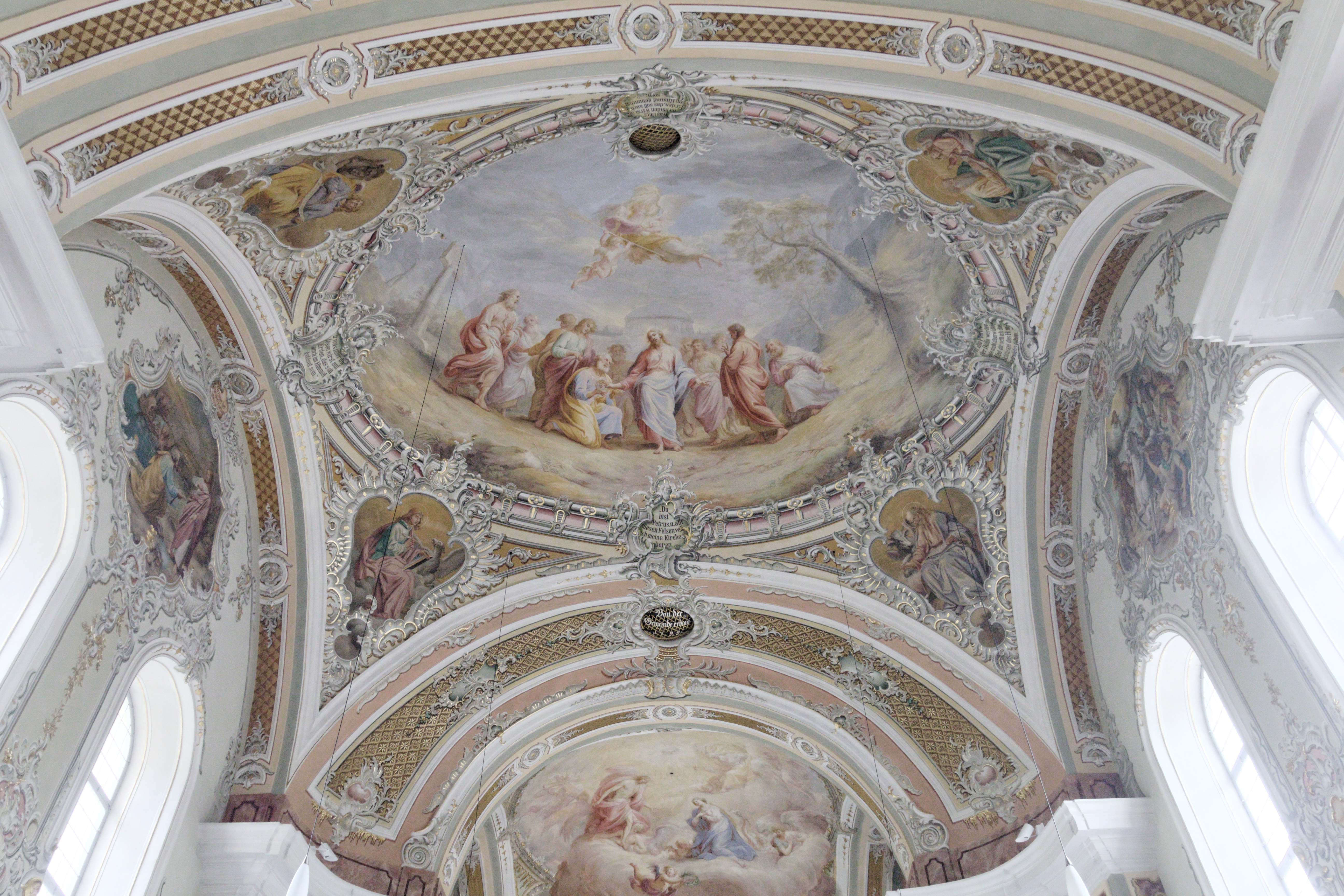 Villnöß, Pfarrkirche St. Peter und Paul; Deckengemälde von Joseph Schöpf